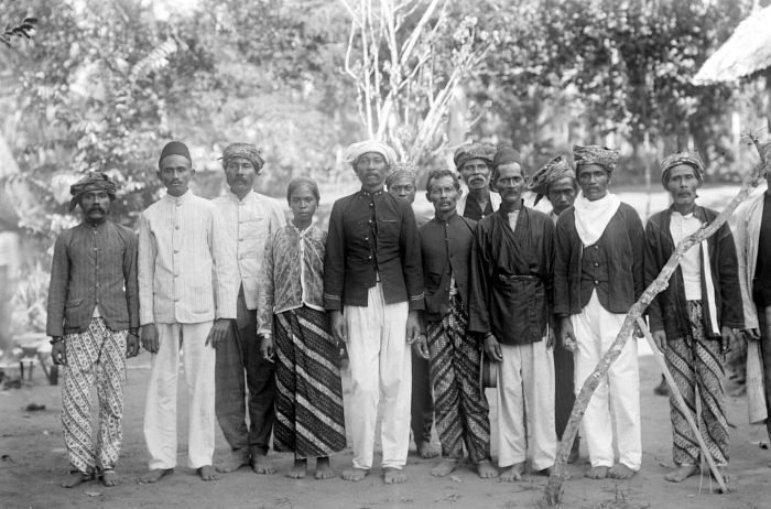 Negatief. Districtshoofd en kamponghoofden uit Galela, Halmahera